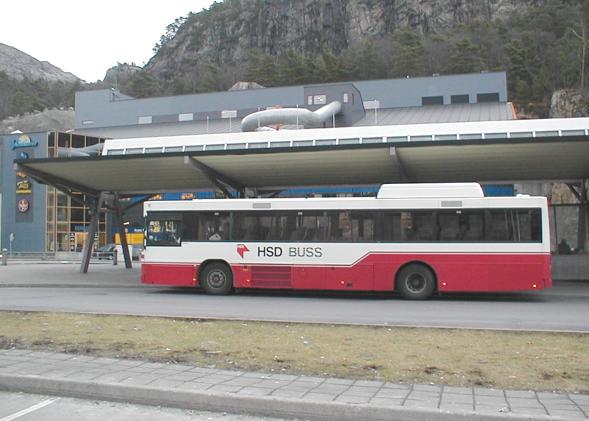 Bus from HSD (Hardanger Sunnhordlandske Dampskipsselskap ASA) at Vestkanten Terminal, Bergen, Norway.